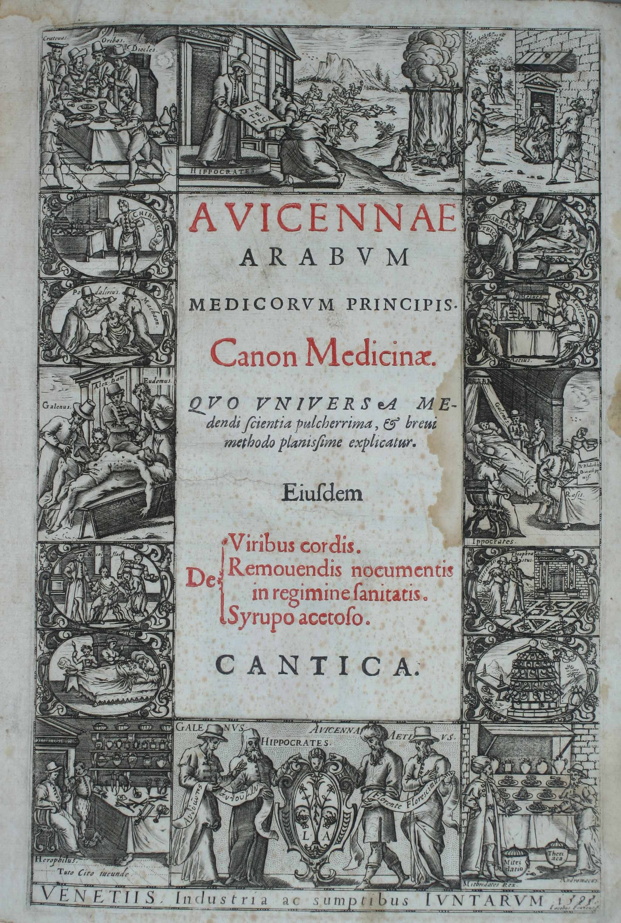 Tractat de medicina d'Avicenna, metge persa (970-1037), publicat a Venècia on s'hi recullen els cànons o principis de la medicina. Dades tècniques Títol: Avicennae .. canon medicinae : qvo vniversa medendi scientia pulcherrima & breui methodo planissime explicatur ; eiusdem de viribus cordis ; remouendis nocumentis in regimine sanitatis ; syrupo acetoso Data: 1595 Suport material: Paper Mides: 250 x 350 cm